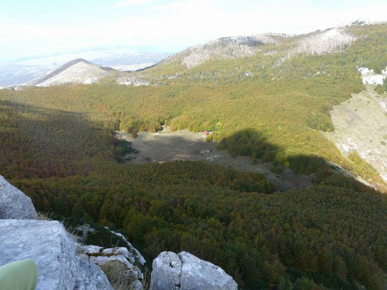 Kurtagića dolac na Kamešnici